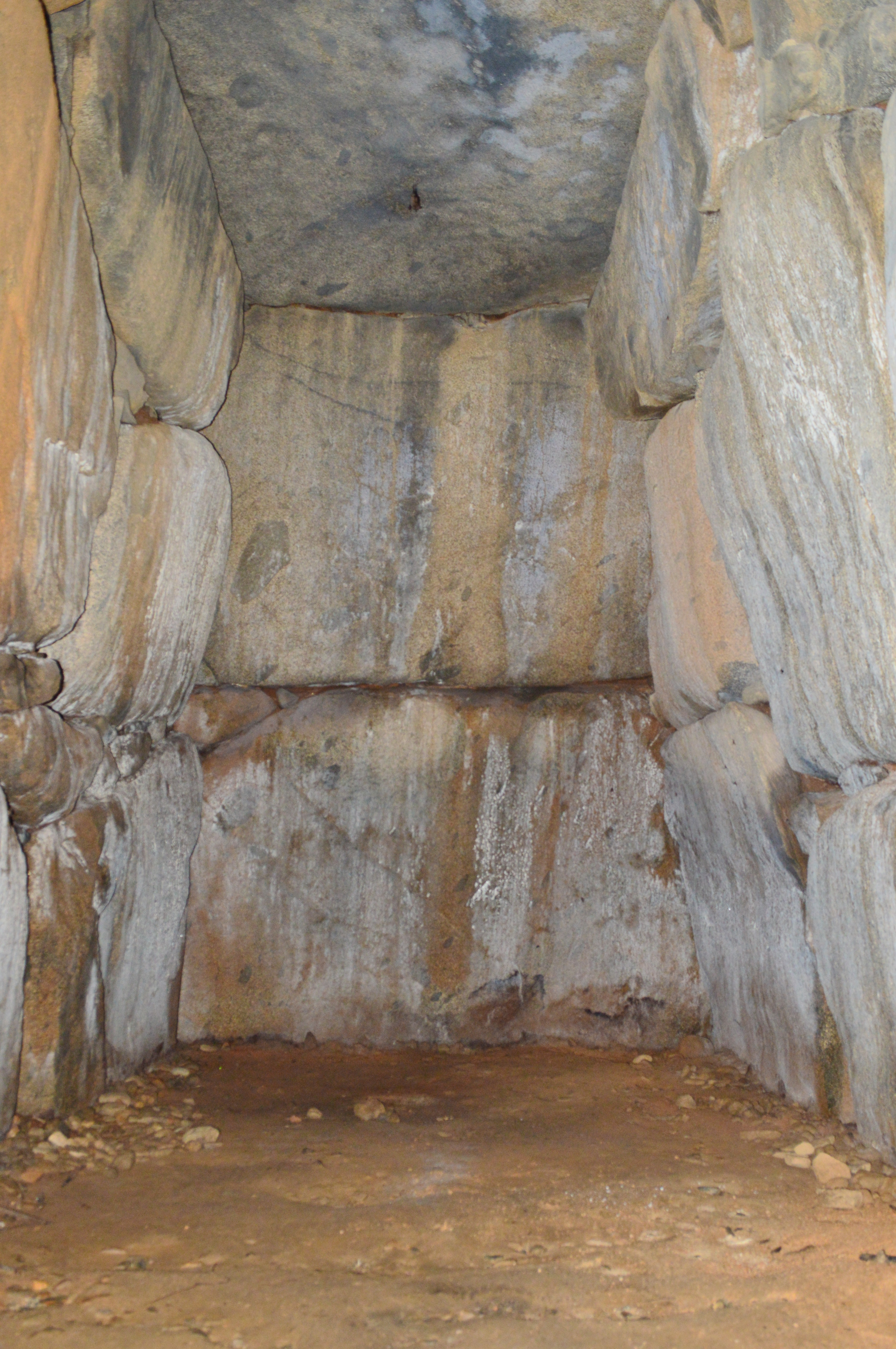 谷首古墳 石室玄室